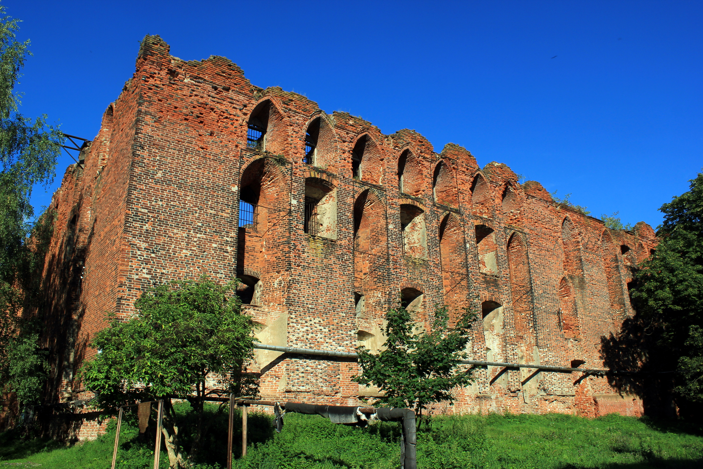 Ruine der Ordensburg Ragnit in Neman (früher Ragnit), Oblast Kaliningrad, Russland.